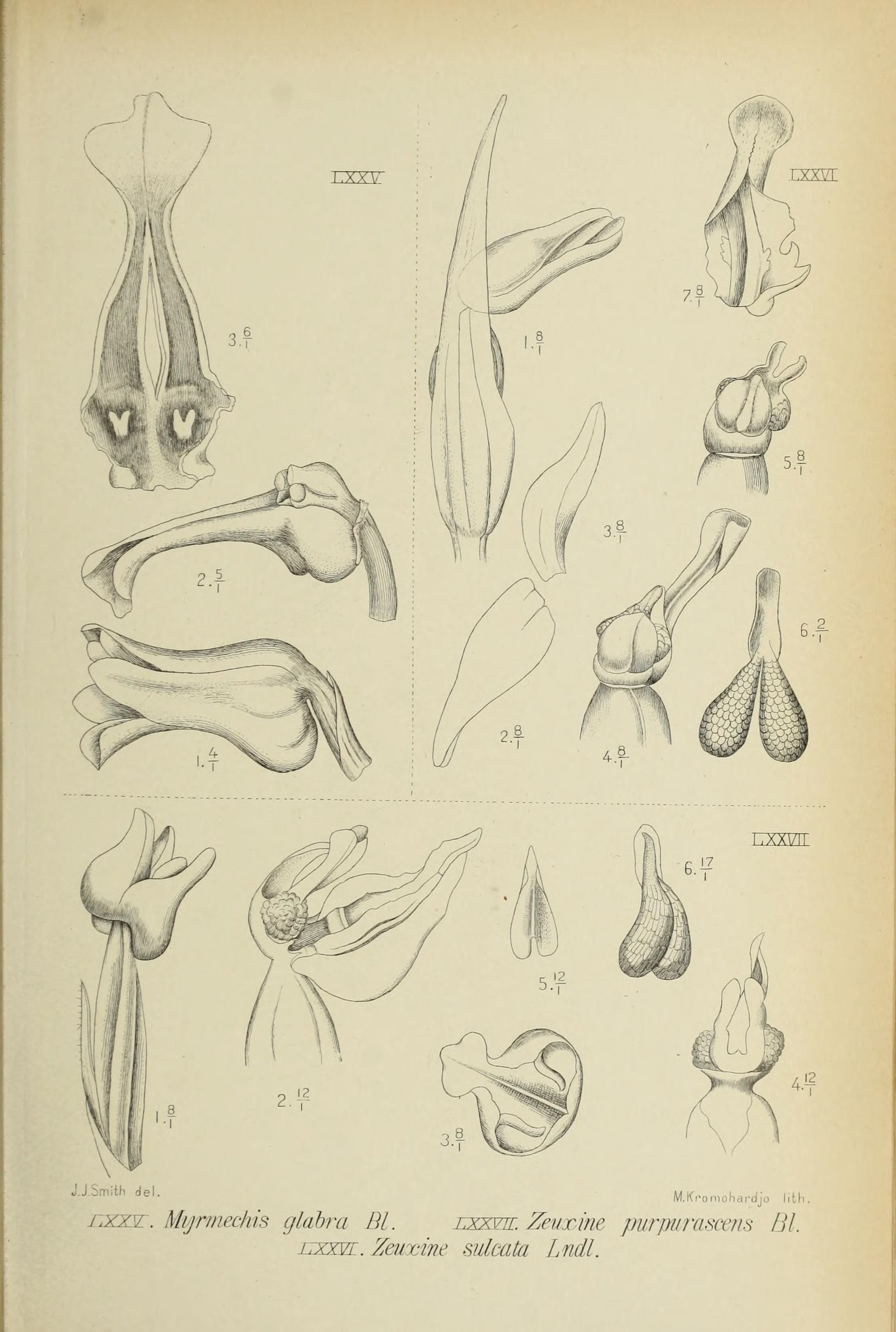 Die orchideen von Java /